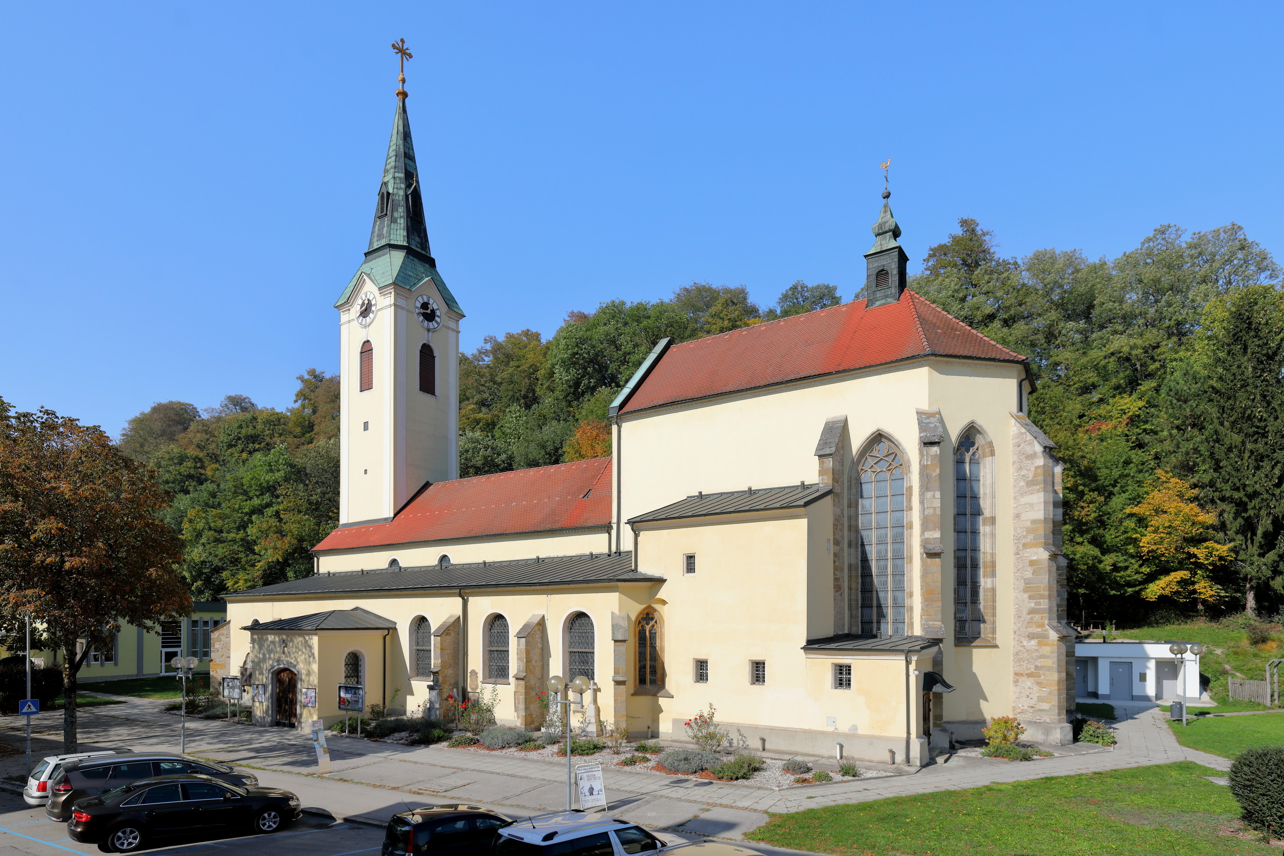 Südostansicht der röm.-kath. Pfarrkirche St. Stephan in der niederösterreichischen Stadtgemeinde Amstetten. Eine spätgotische Kirche mit stark erhöhtem, von Seitenchören flankierten, lang gestrecktem Polygonalchor und eingestelltem romanischen Westturm.